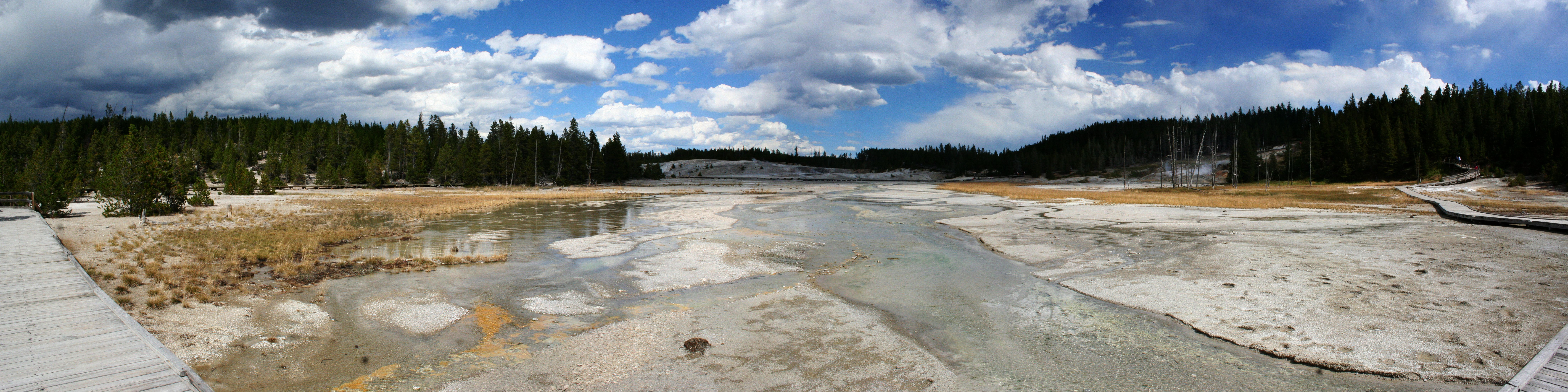 Norris Geyser Basin - Porcelain Basin (widok ogólny)